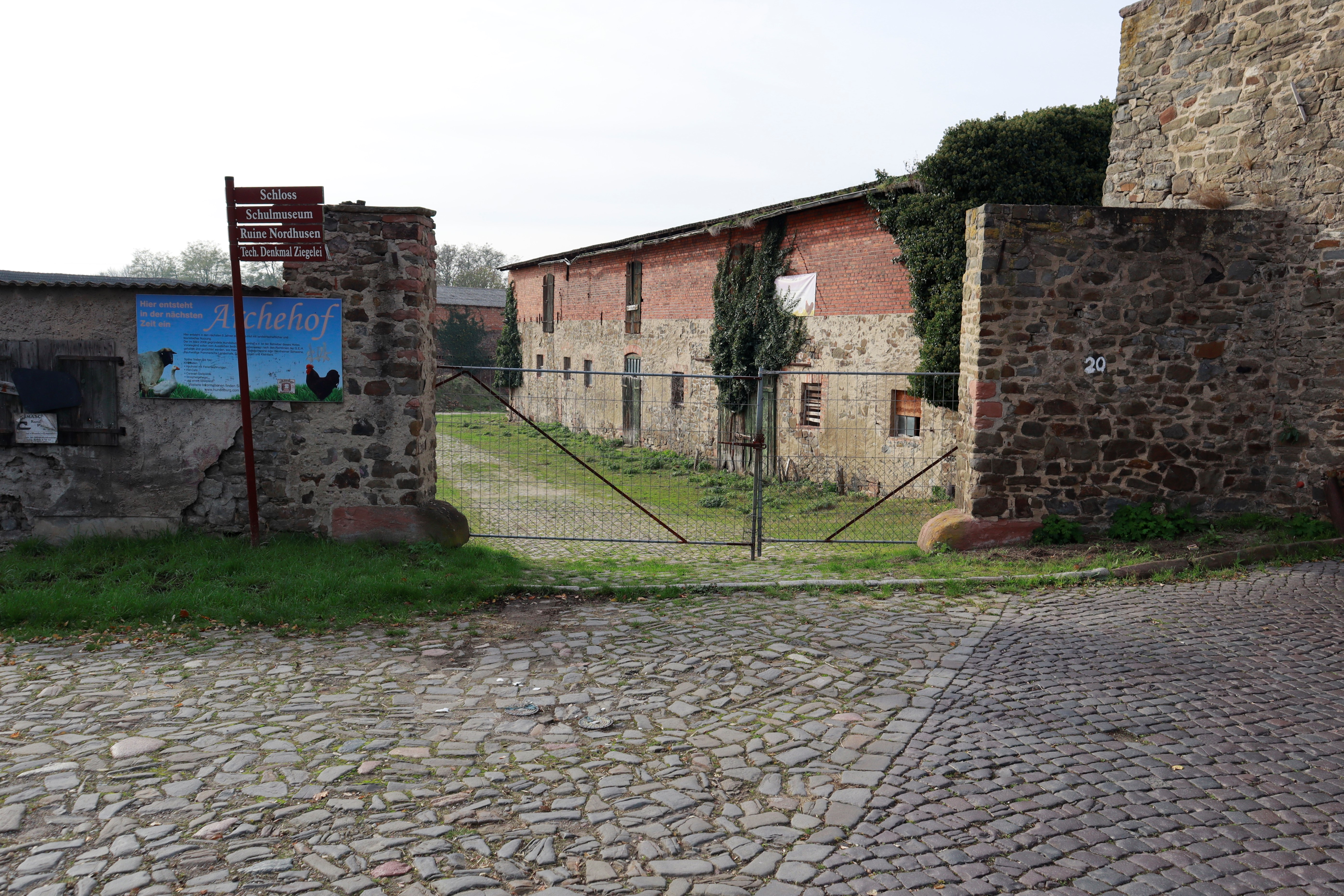 Unterhof (Hundisburg), genutzt als “Archehof”